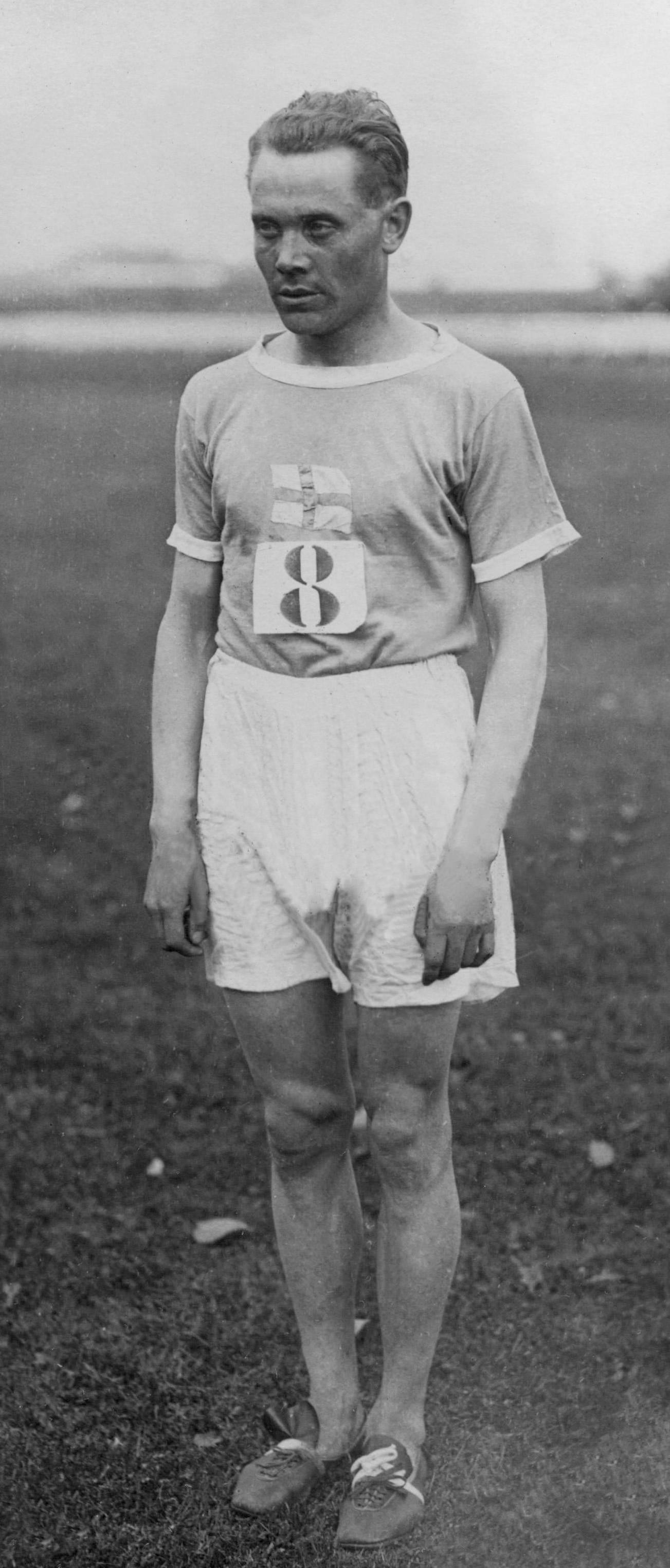 Paavo Johannes Nurmi [1897-1973] Fins atleet. Is de belangrijkste midden- en lange afstandsloper uit de atletiekgeschiedenis. Wint tijdens de Olympische Spelen van 1920, '24 en '28 negen Olympische medailles. Foto: Nurmi poseert voor de fotograaf na het behalen van zijn zoveelste Olympische medaille tijdens de Olympiade in Parijs in 1924.